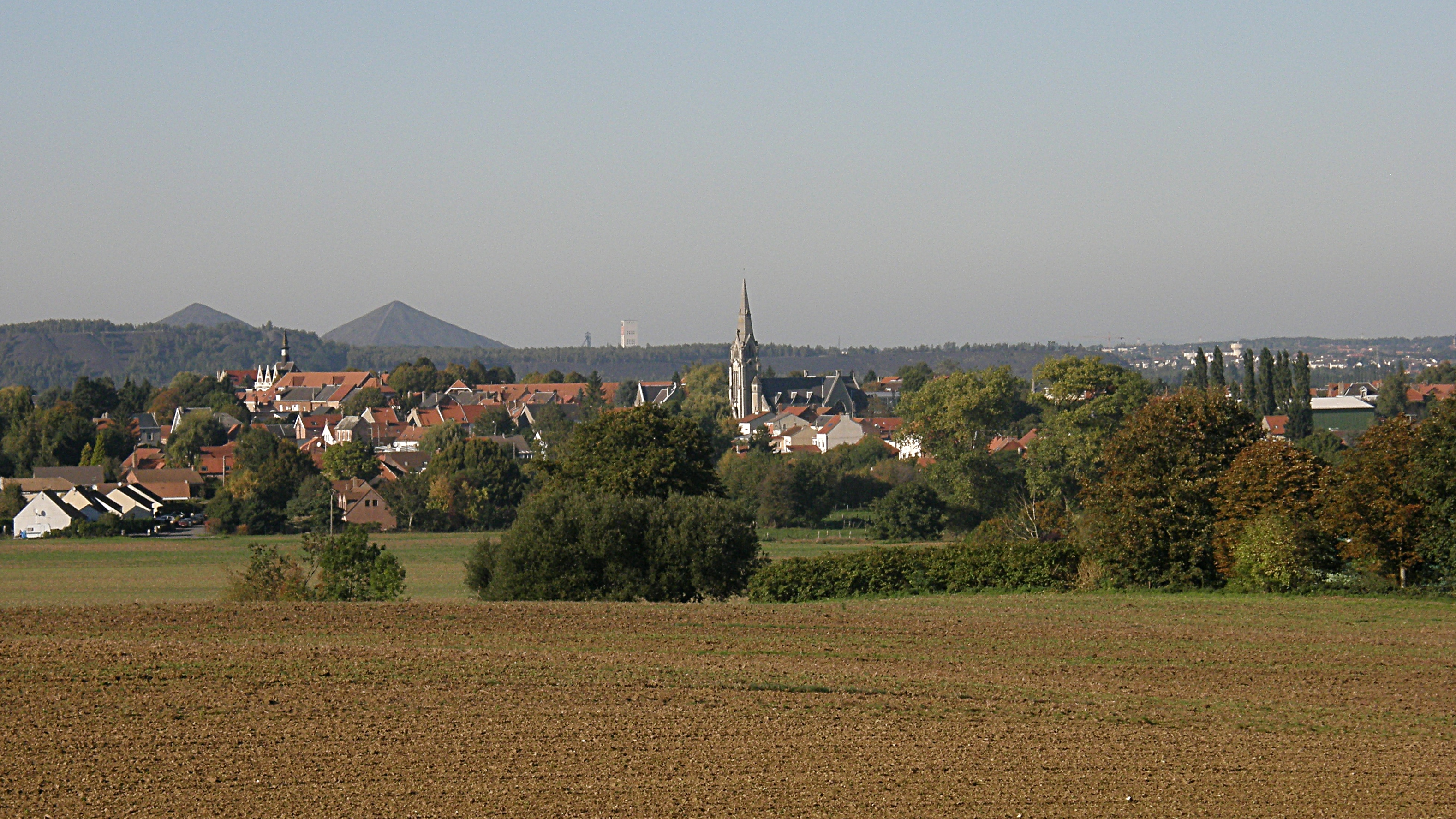 Vimy (Pas-de-Calais, France). Panorama, vu de Farbus. A l'arrière-plan, à gauche, les terrils jumeaux du 10/19 de Loos-en-Gohelle, les plus hauts d'Europe.